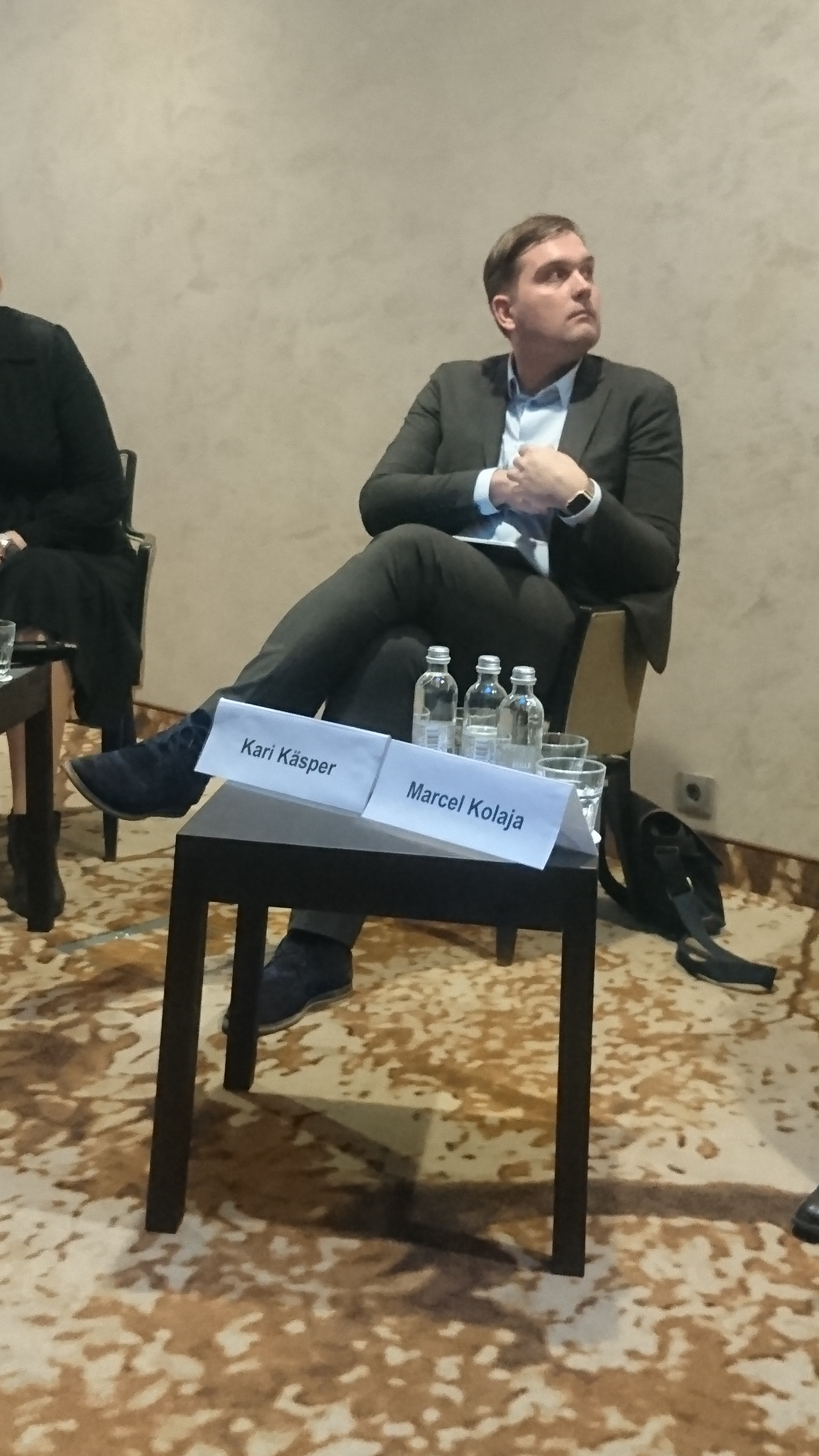 Kari Käsper autoriõiguskonverentsil 22. märtsil 2019 Tallinnas